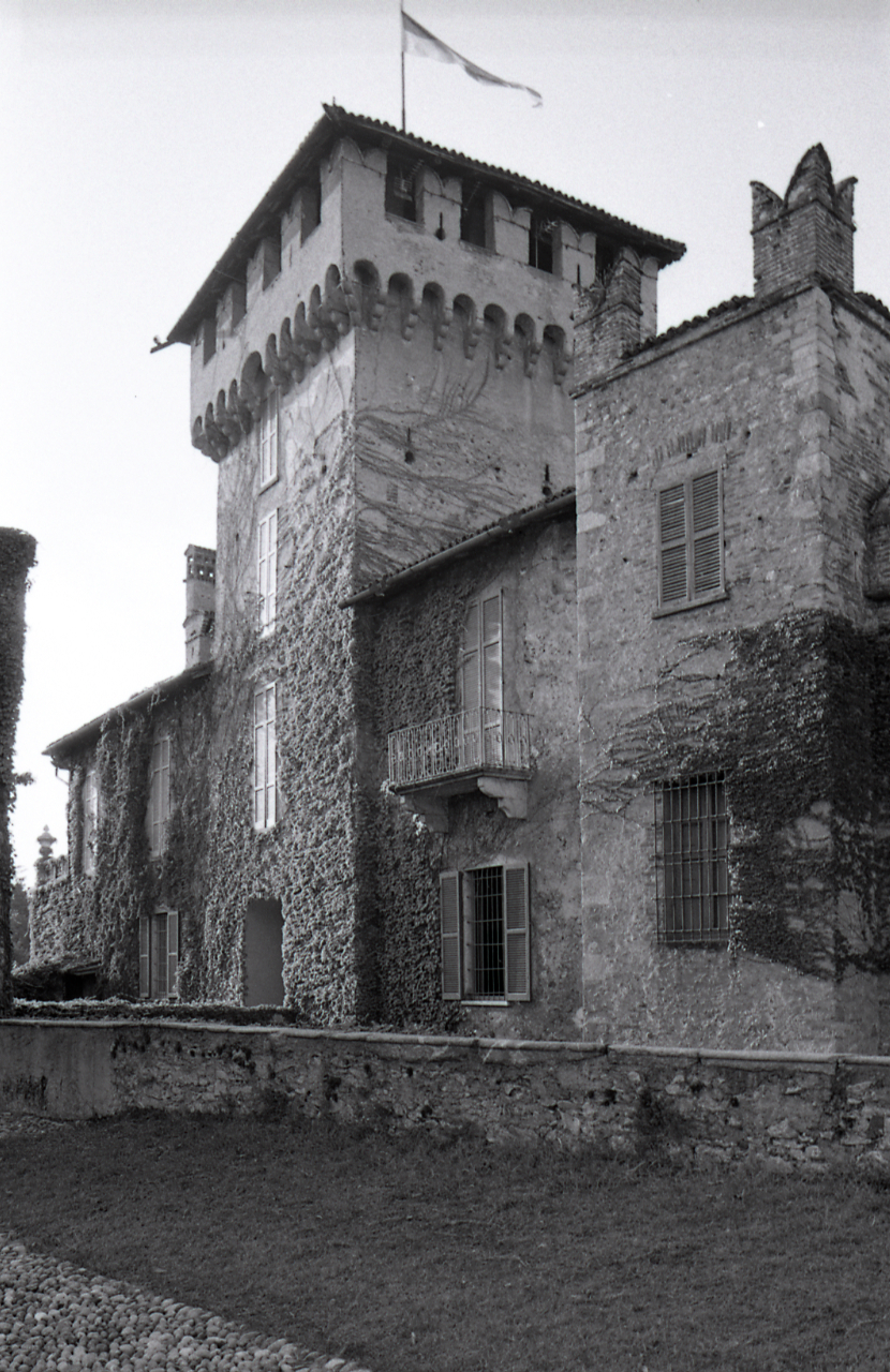 Somma Lombardo. Castello. Edizioni Rusconi. Servizio fotografico : Somma Lombardo, 1980 / Paolo Monti. - Strisce: 4, Fotogrammi complessivi: 20 : Negativo b/n, gelatina bromuro d'argento/ pellicola ; 35 mm. - ((Sul portanegativi: N[I]K[MA]T FP4. - La serie è identificata da Monti con segni grafici e distinta dalla successiva. - Confronta scheda 3552Lpbn01A-20A e 3552bisLpbn01A-20A. - Occasione: Documentazione per la pubblicazione: Vincenti Antonello, "Castelli viscontei e sforzeschi", Milano, Rusconi immagini, 1981. - Fonte: Agenda di Paolo Monti: Nikon Leika 3001-/ Monti 1978 (1978-1982), presso Archivio Paolo Monti. - Fonte: Monografia di Vincenti, Antonello: Castelli viscontei e sforzeschi, Milano, Rusconi immagini (1981)